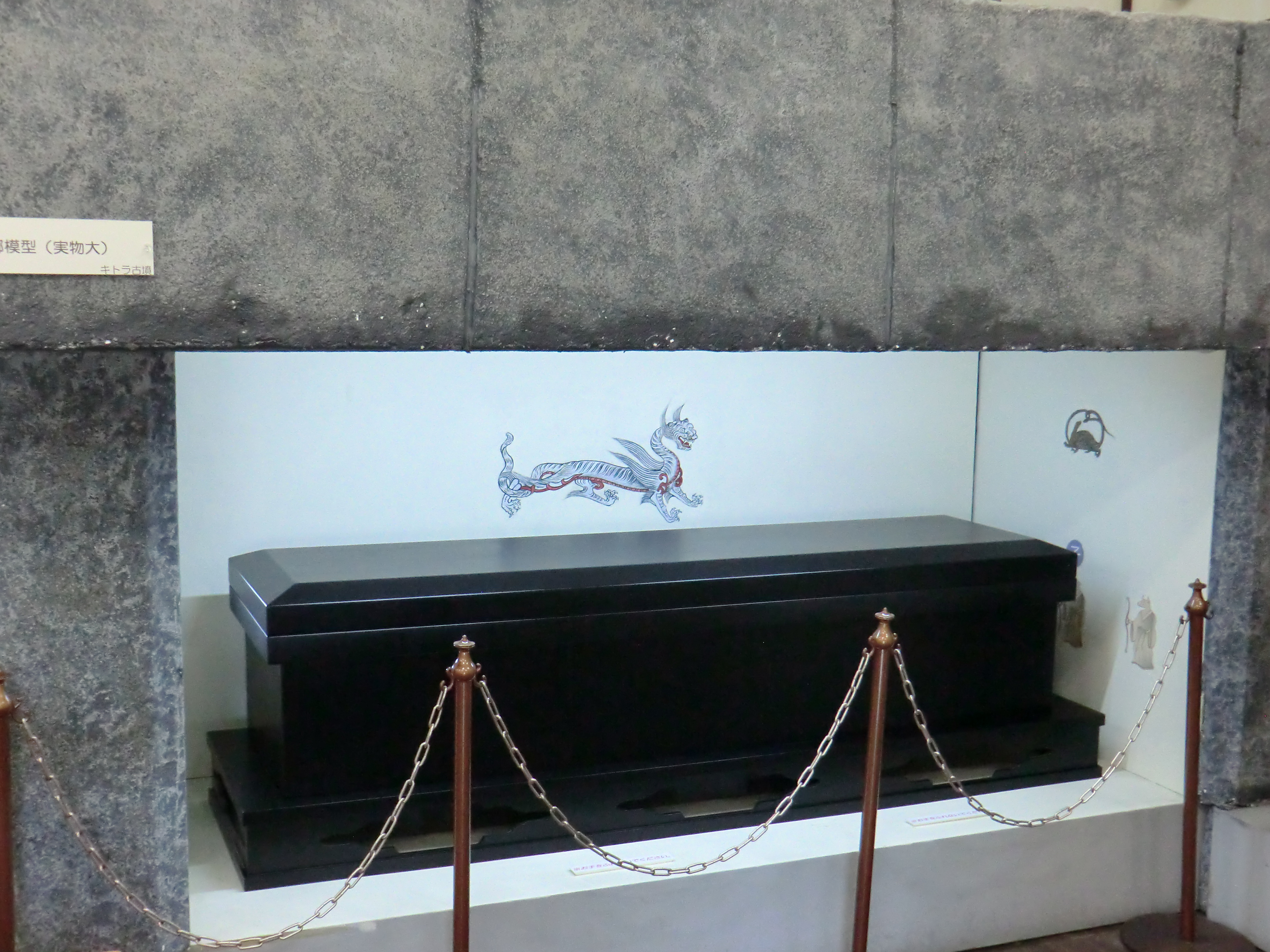 キトラ古墳、石槨模型。（明日香村埋蔵文化財展示室）